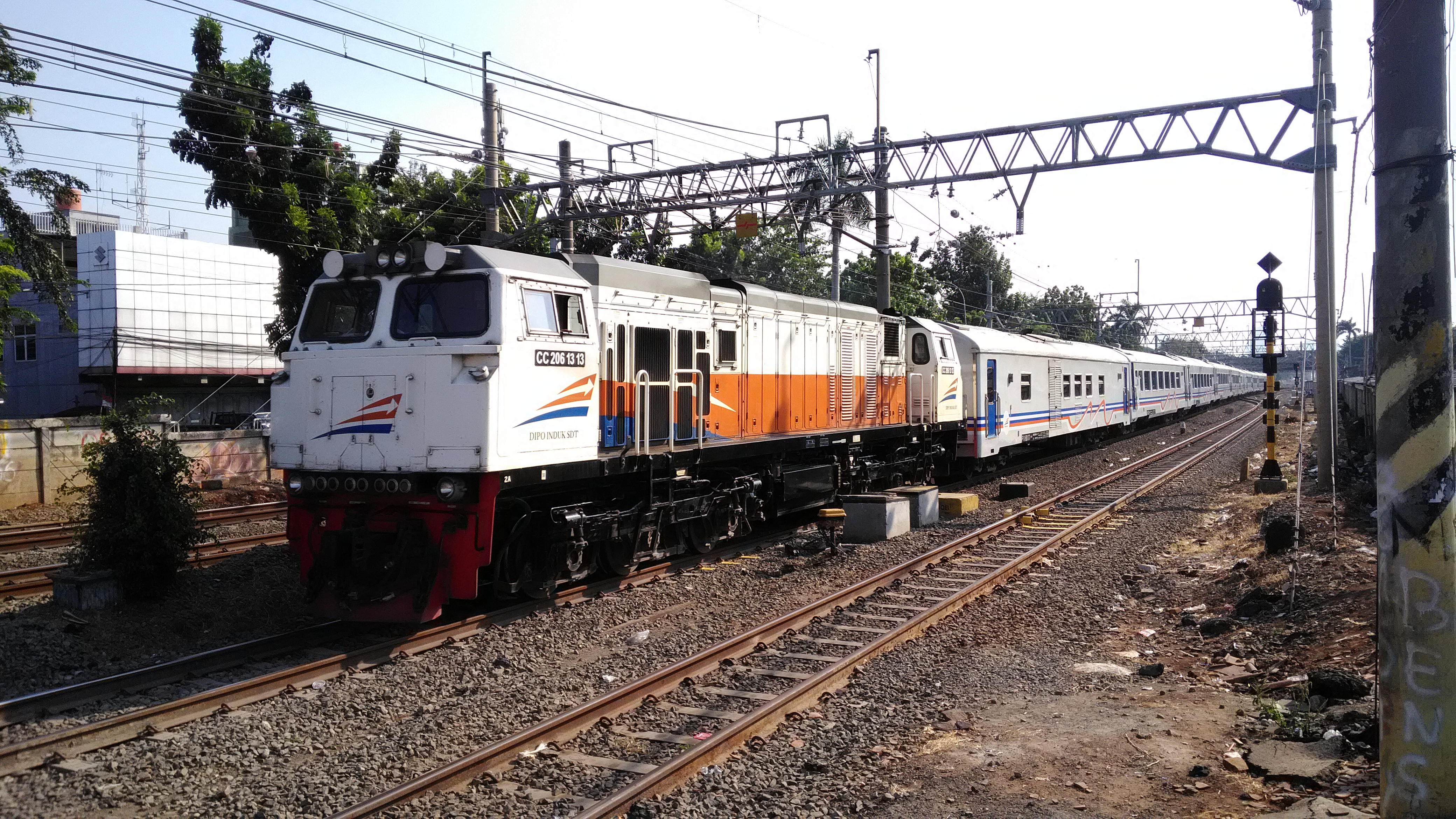 Sunda: Kareta api Bangunkarta